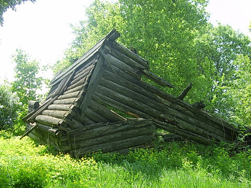 Балонаў Сялец. Руіны царквы